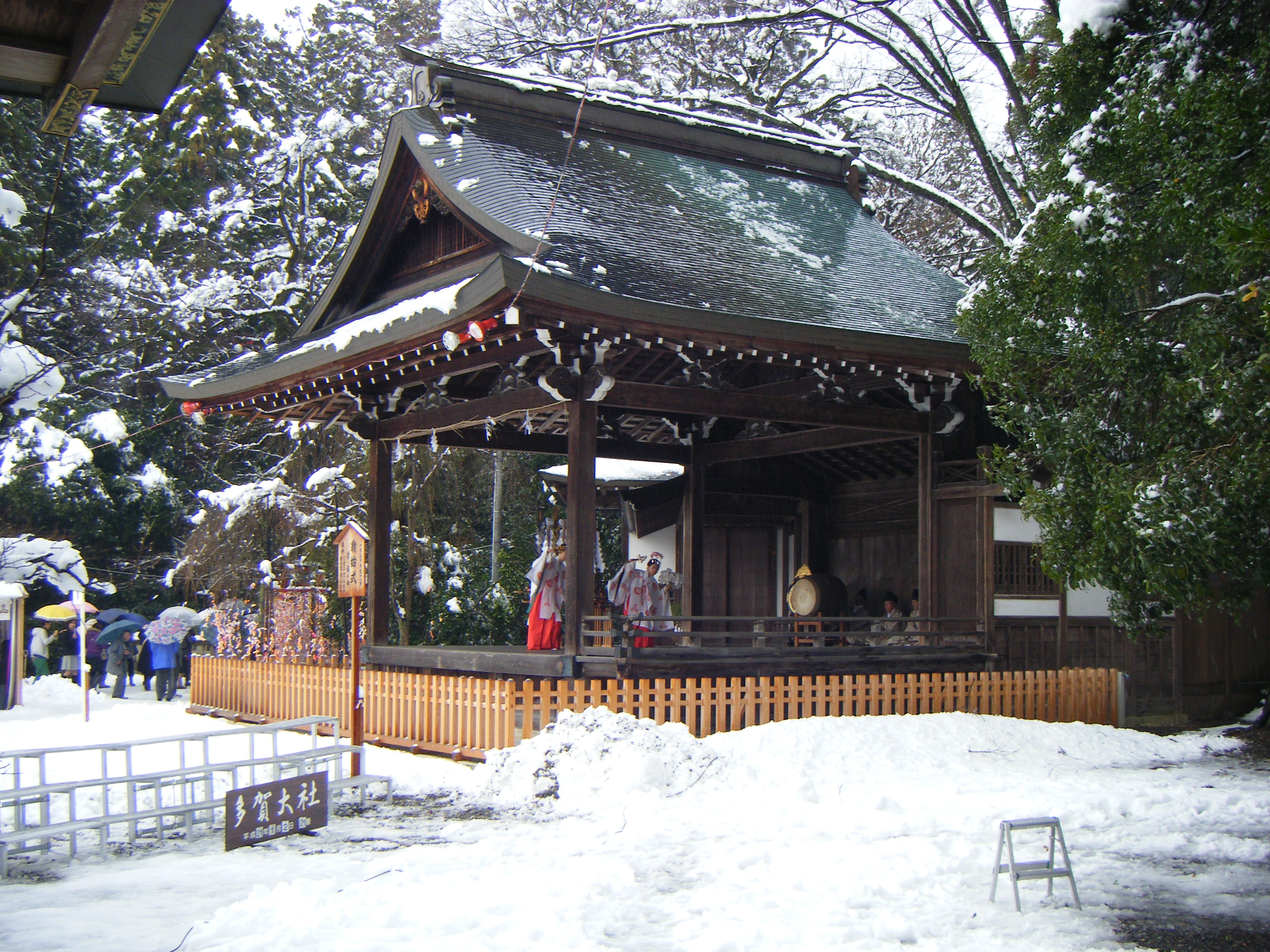 多賀大社での新年神楽